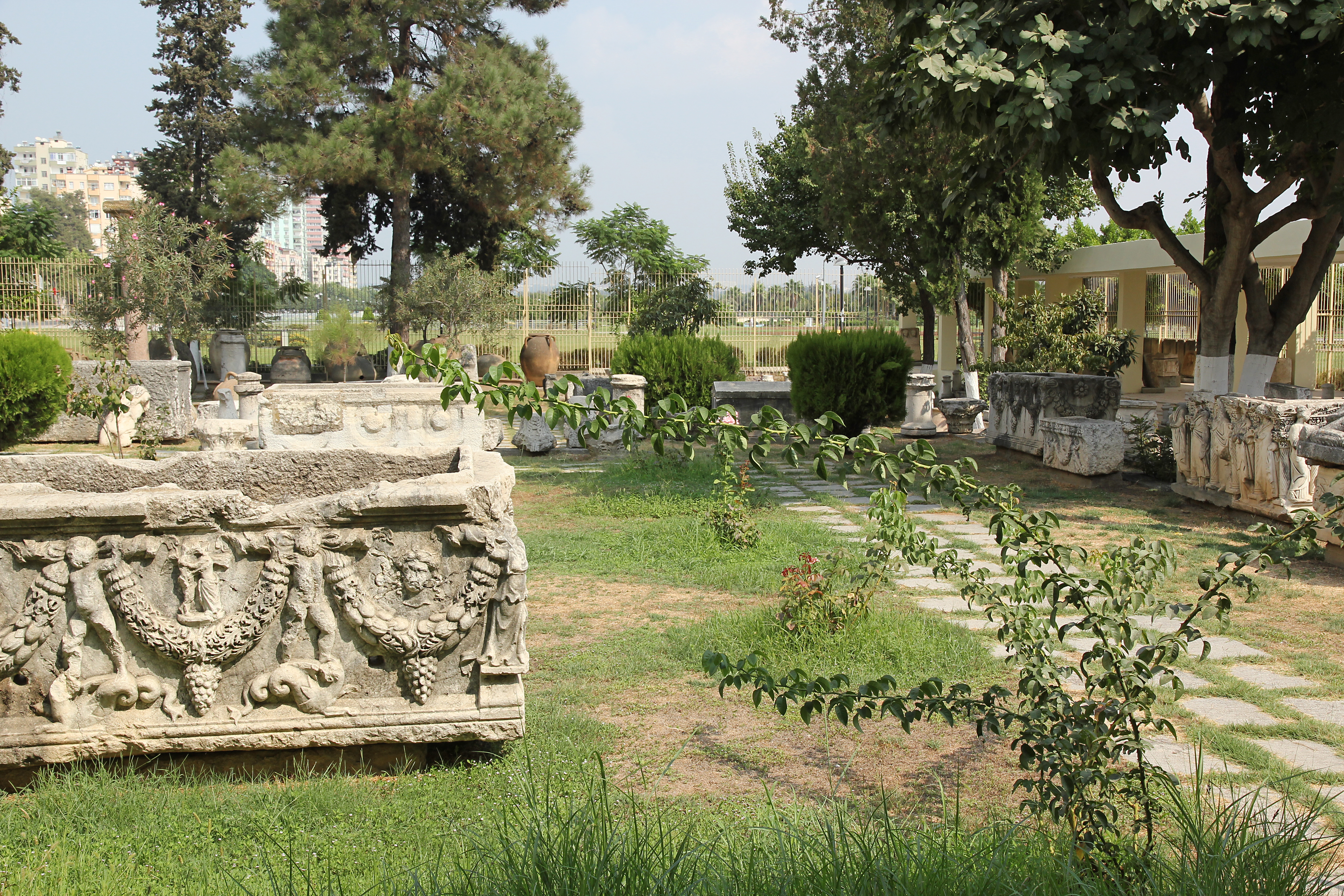 Archäologisches Museum Adana, Südtürkei, Außenbereich, früheres Gebäude bis 2016